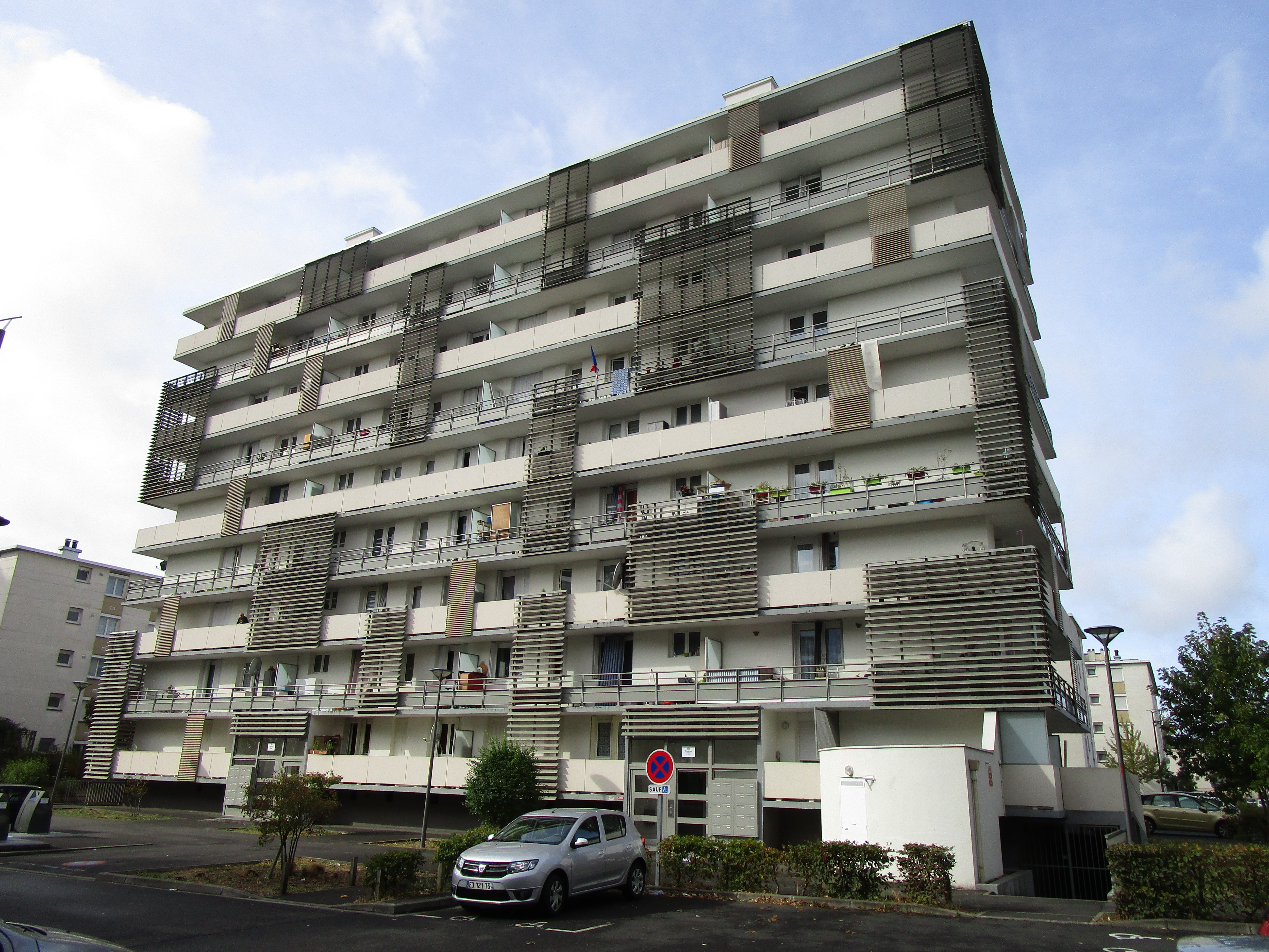 Immeuble rénové rue Delorme, quartier de la La Rabière à Joué-lès-Tours.